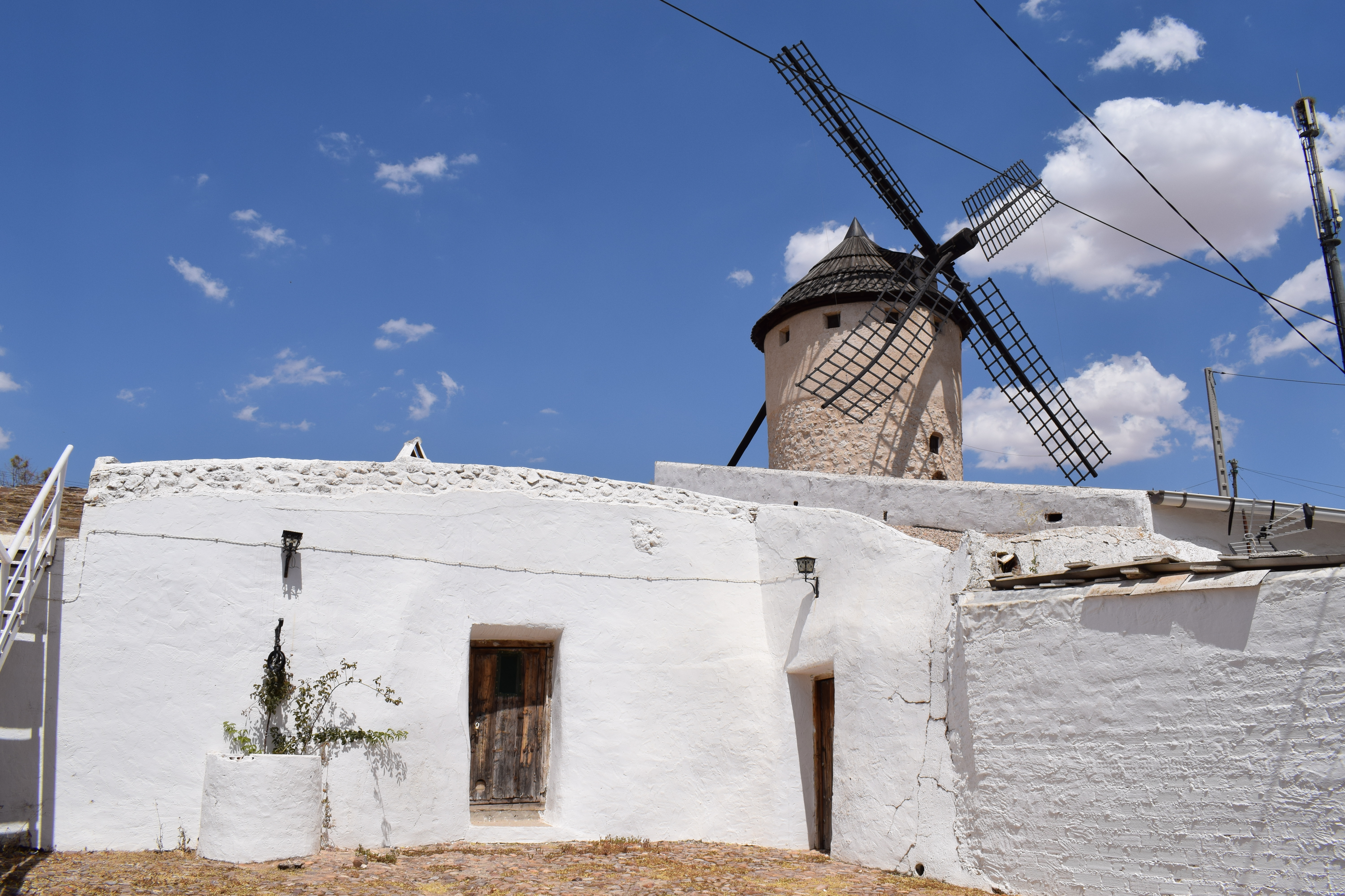 Molino y Silo (casa cueva) municipal en Quero